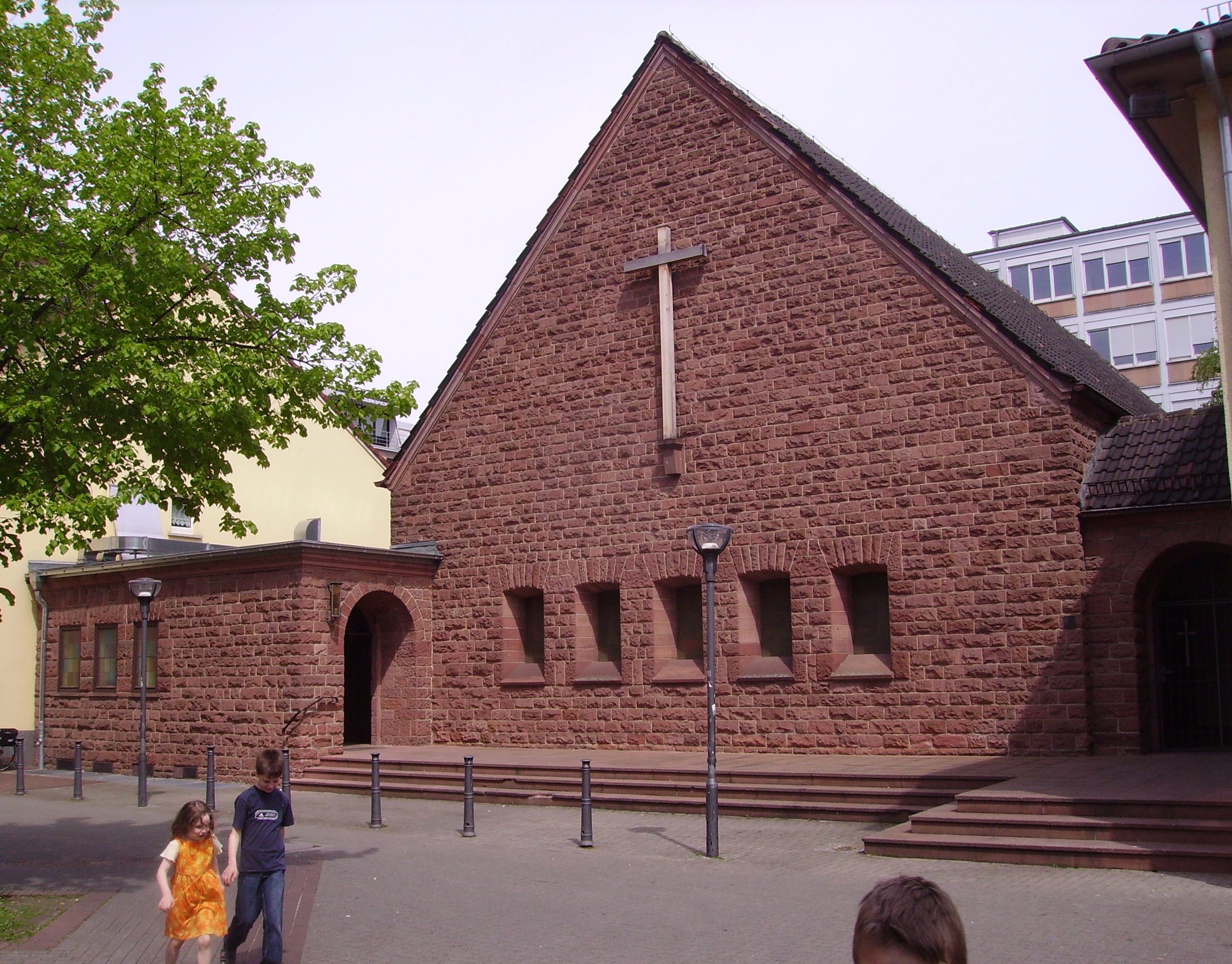 church in Ludwigshafen in Rhineland-Palatinate, Germany